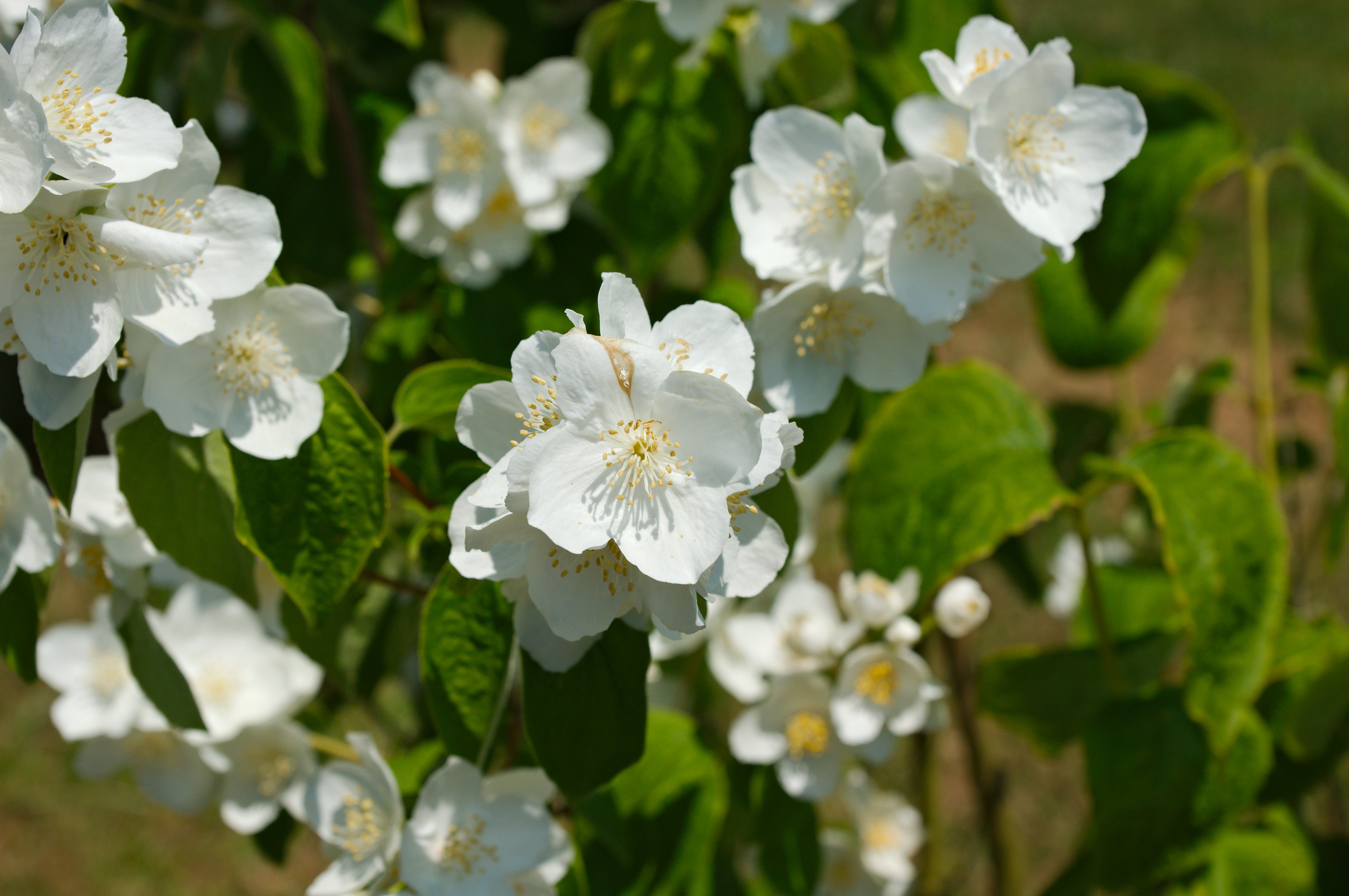 Fleur de Philadelphus inodorus 'Grandiflorus' du jardin d’Amérique du Nord des Jardins Suspendus du Havre dans l’ancien fort de Sainte-Adresse